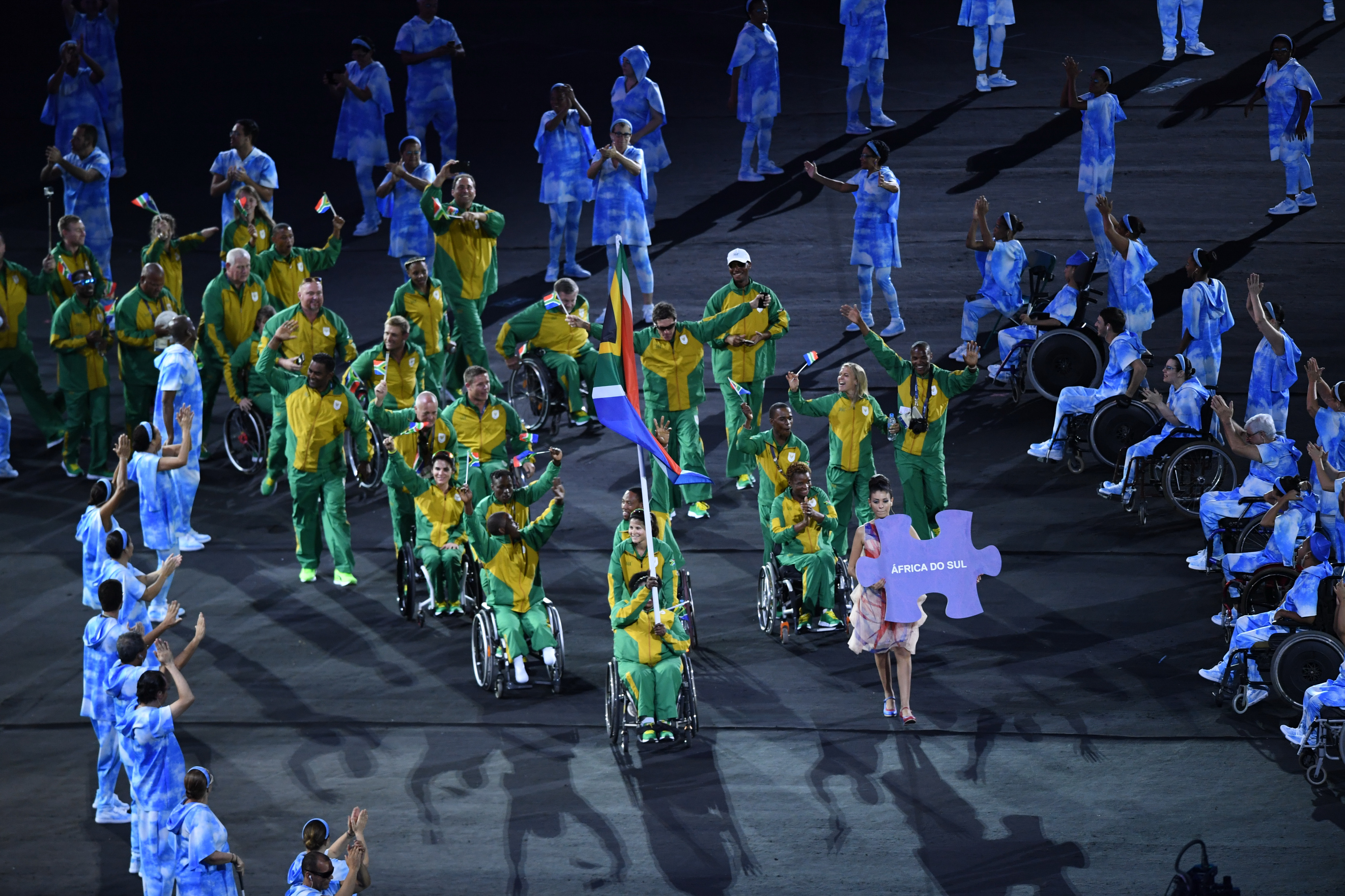 Rio de Janeiro - Cerimônia de abertura dos Jogos Paralímpicos Rio 2016 no Estádio do Maracanã